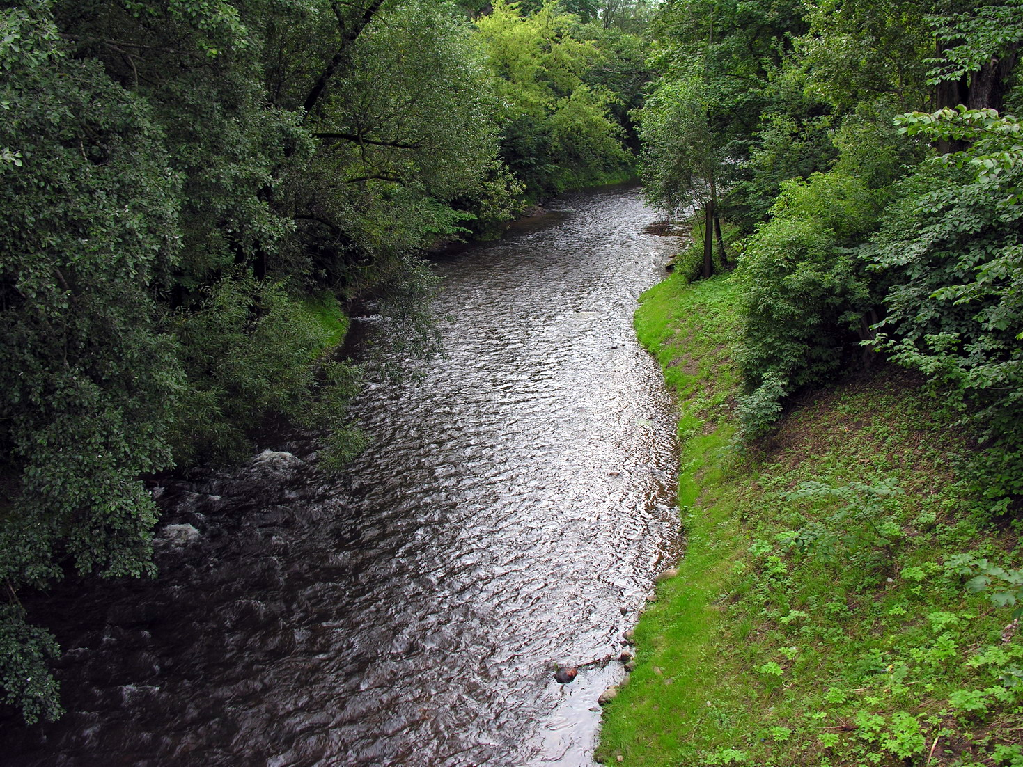 Vilnelė Foto: Algirdas, 2006 m. rupgjūčio 8 d., Lietuva